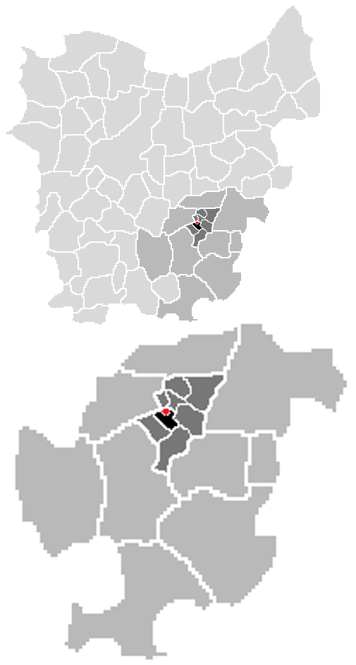 Oost-Vlaanderen uitgeknipt en bewerkt